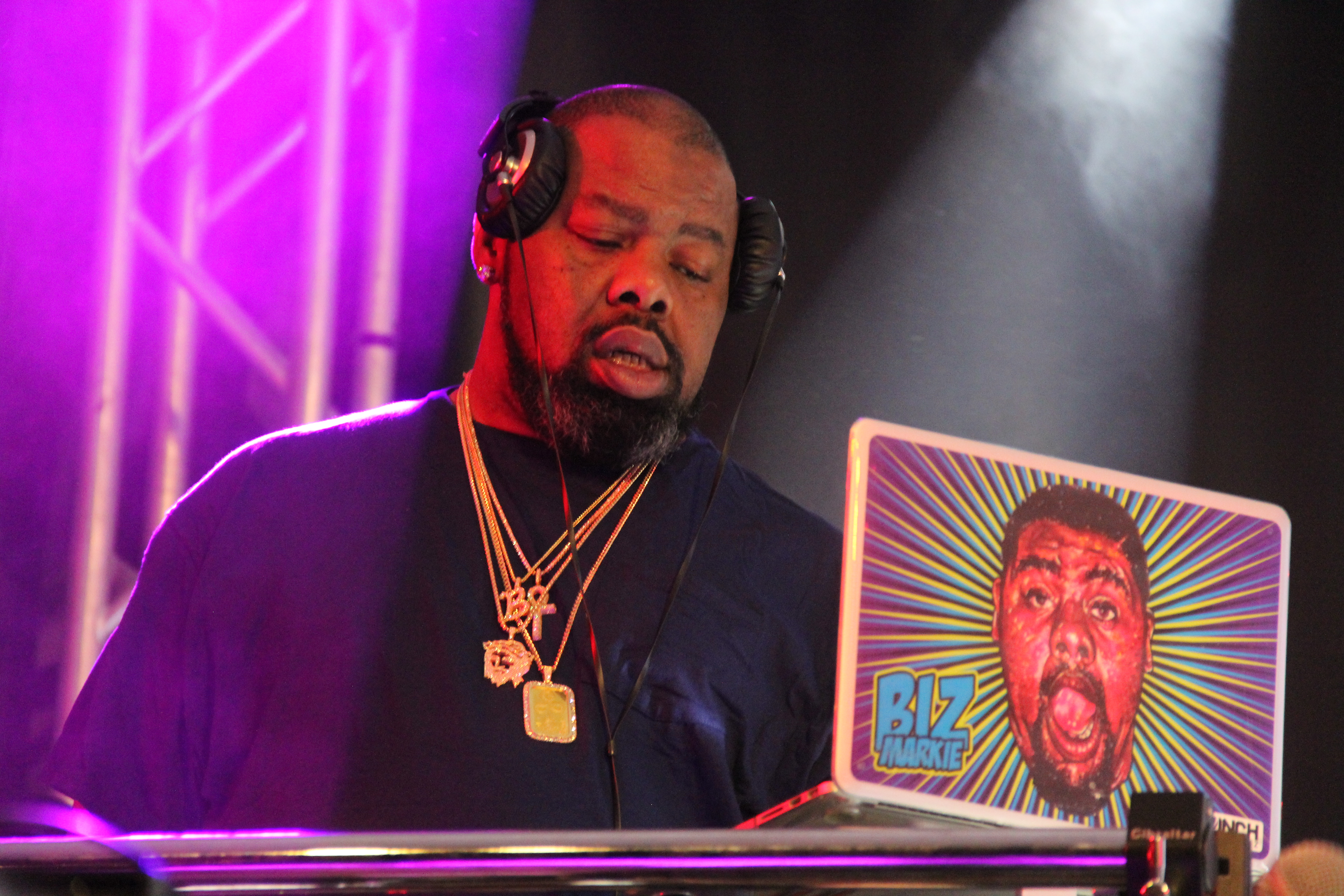 Biz Markie performing Taken at SXSW 2016.